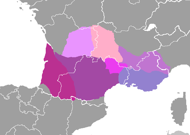 Dialectos del idioma occitano. auvernense gascón languedociano languedociano en cha limosín provenzal vivaroalpino roiasco